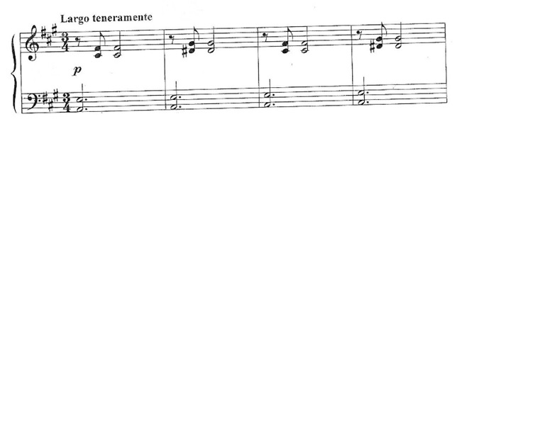 Фото вступу п'єси "Пісня - роздум"